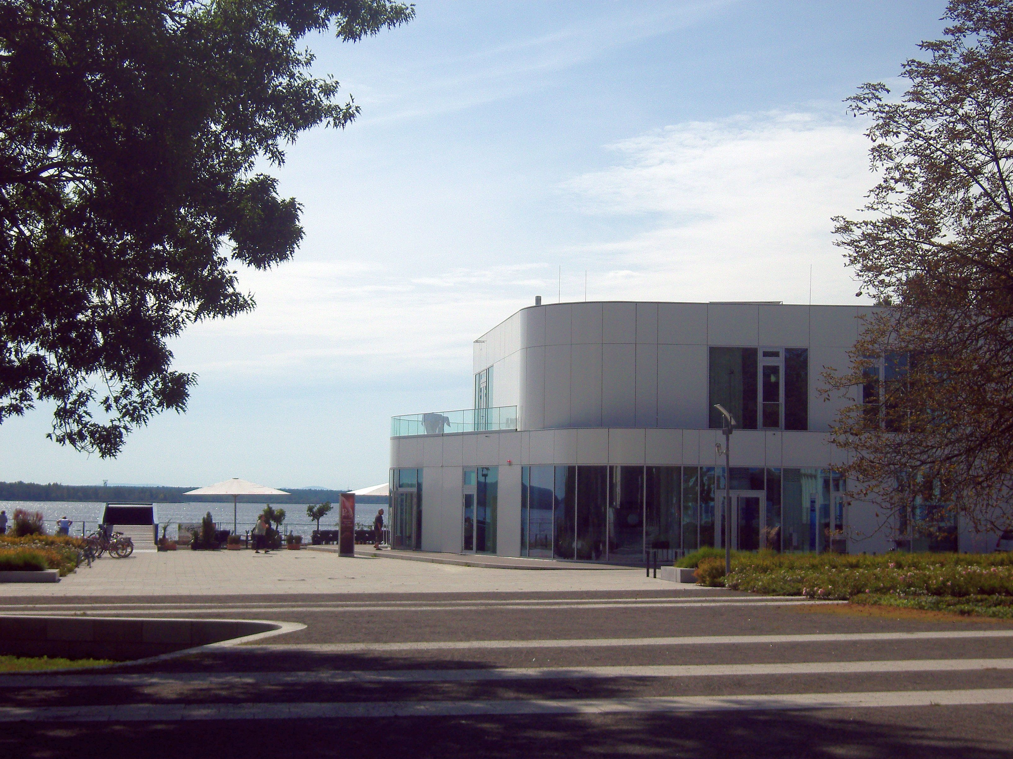 Restaurant Pier 1 in Senftenberg am Senftenberg See